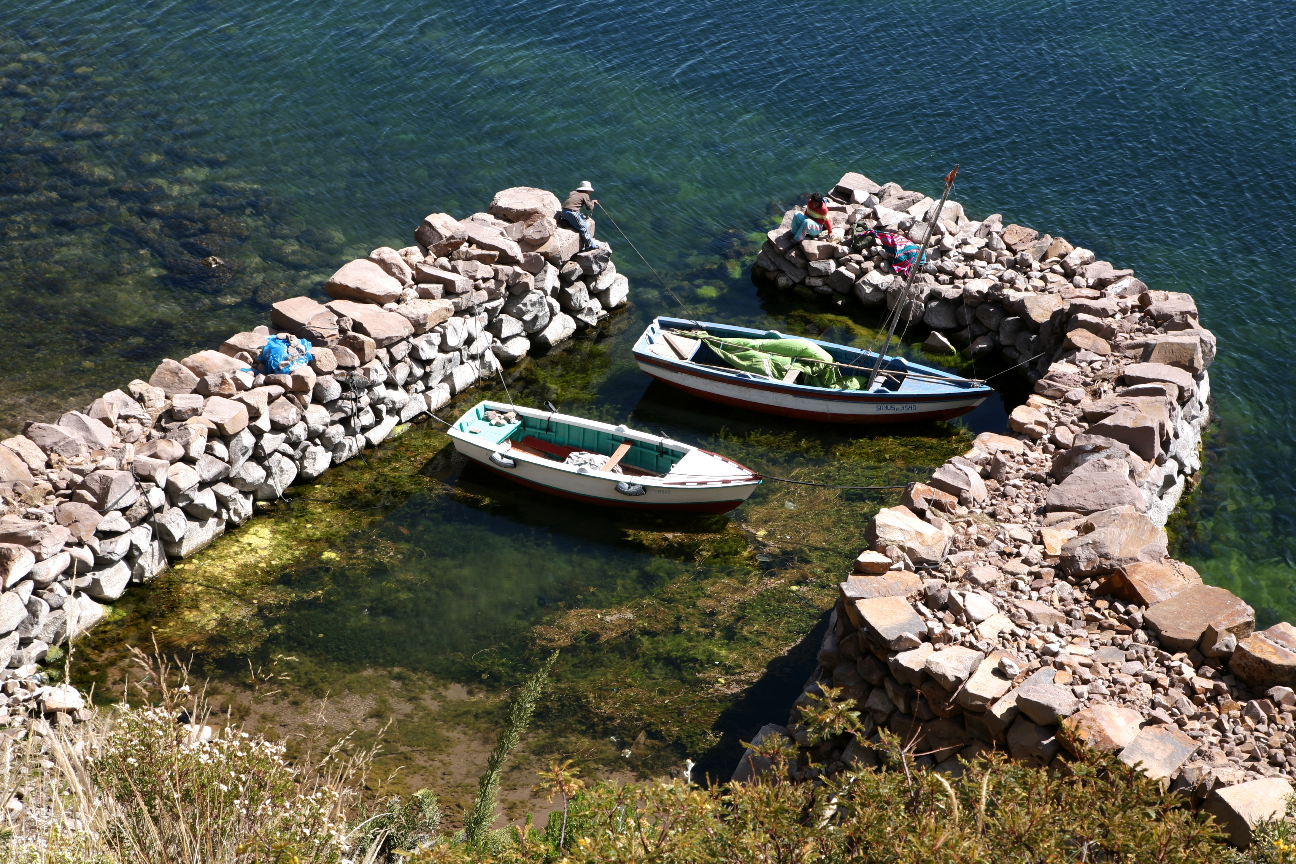 isla Taquile en Puno